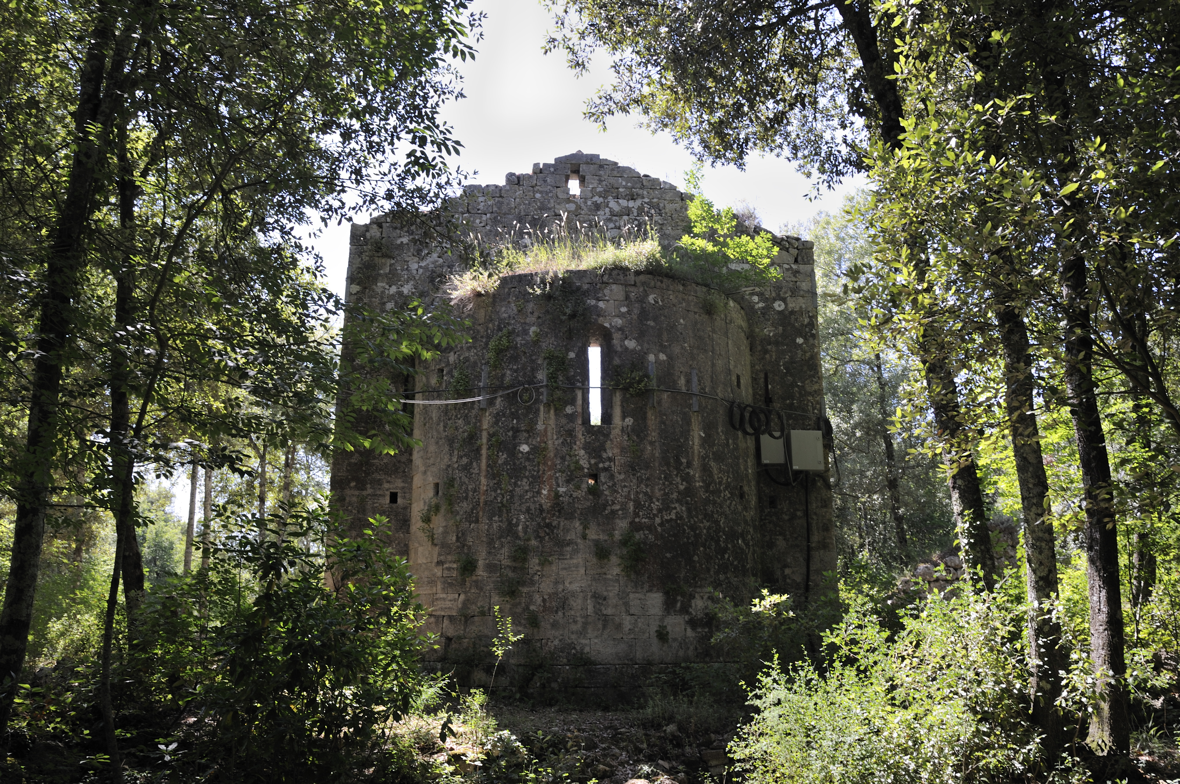 Abside della chiesa dei Santi frediano e Giovanni a Castelvecchio di San Gimignano - Siena